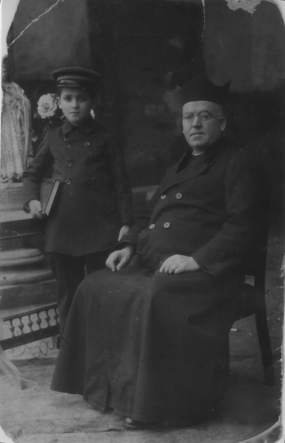 Cándido Catalán Lasalas junto su tío el Padre Cándido Catalán Monrreal Fotografía restaurada y perteneciente a la familia Garcés Catalán.